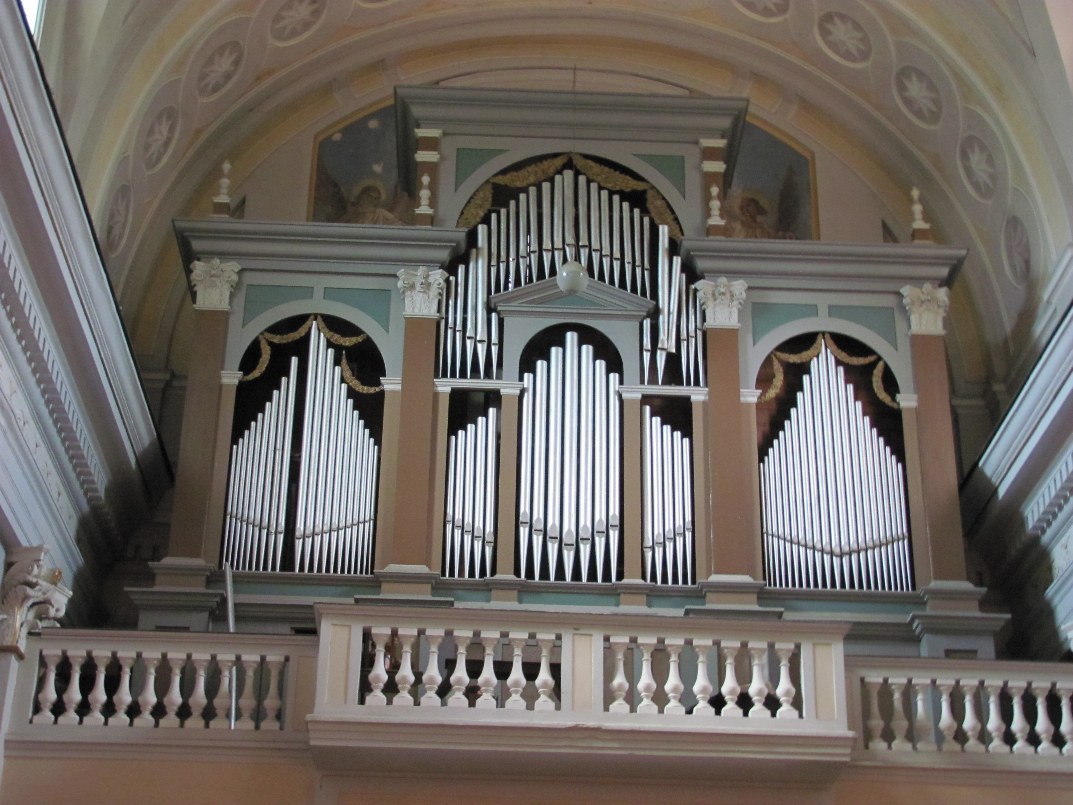 Organo a canne della ditta Michele Schimicci da Formia sito nella Chiesa di San Rocco in Siano (SA), Italia